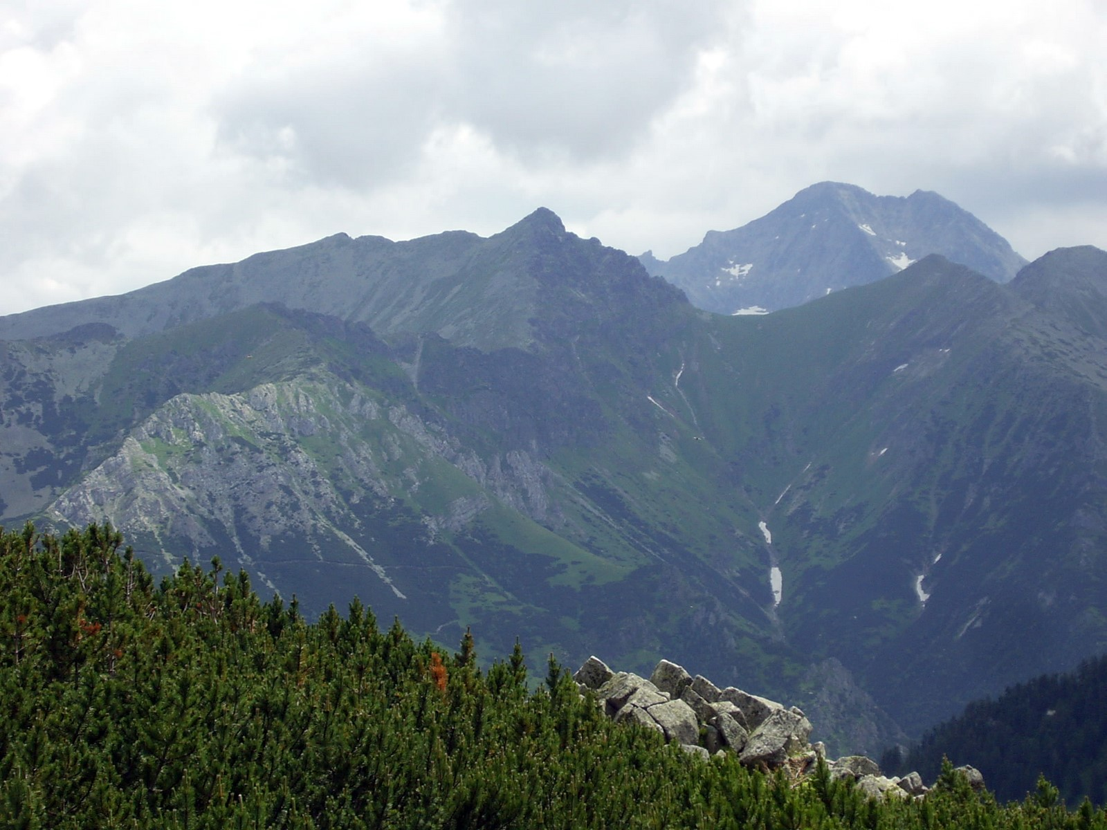 Szeroka Jaworzyńska i Lodowy Szczyt z Równi nad Kępą